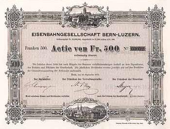 Die 1873 gegründete Bern–Luzern-Bahn (BLB) eröffnete 1875 die Bahnstrecke Bern-Langnau-Luzern. Wegen überhöhter Baukosten war die BLB zahlungsunfähig geworden, so dass sie 1877 vom Kanton Bern als Hauptgläubiger aufgekauft wurde.